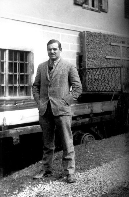 Portrait en pied d'Hemingway devant le 113 rue Notre-Dame-des-Champs à Paris, où il résida entre 1924 et 1926.